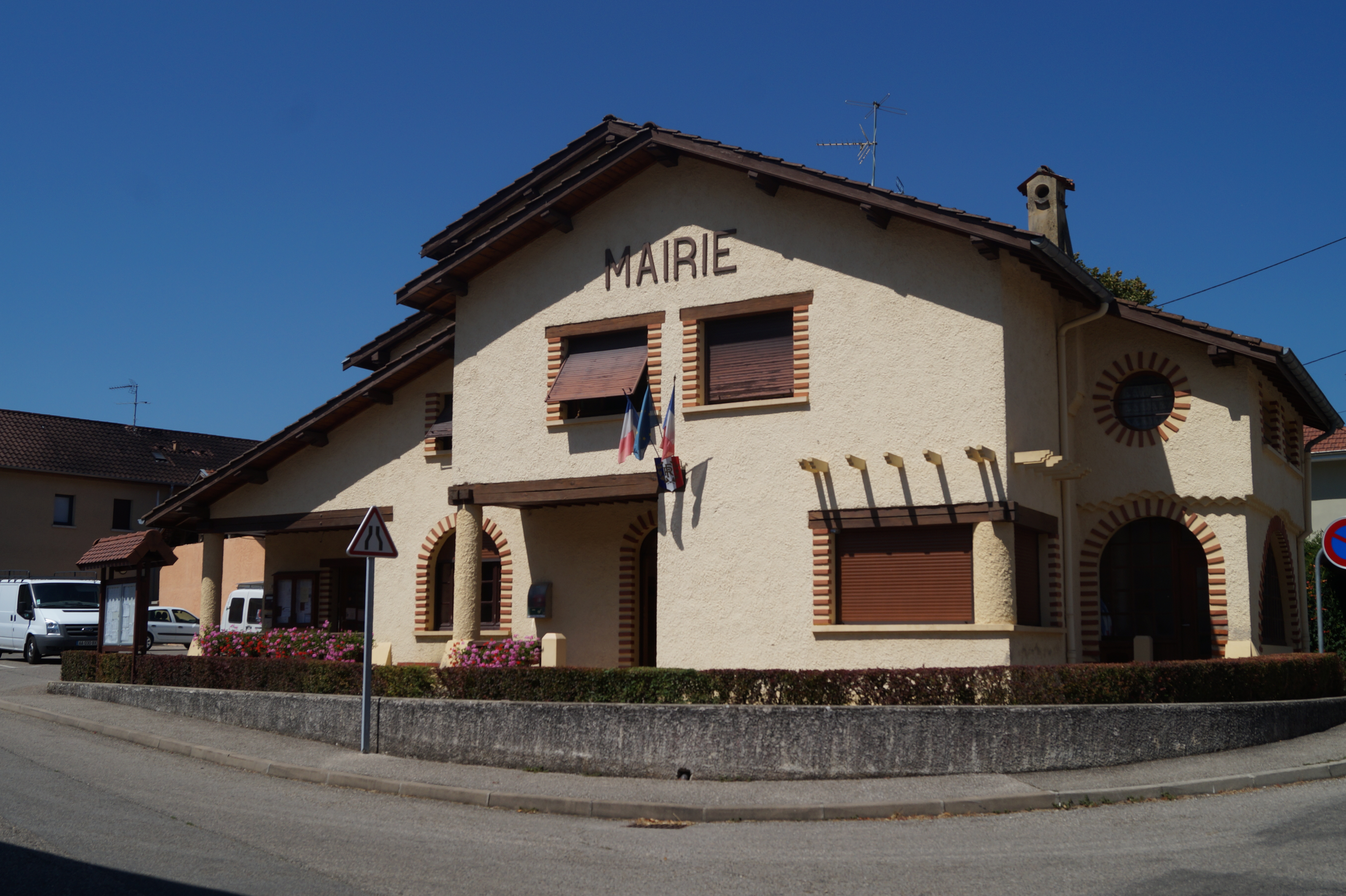 Mairie du village du Mottier en Isère